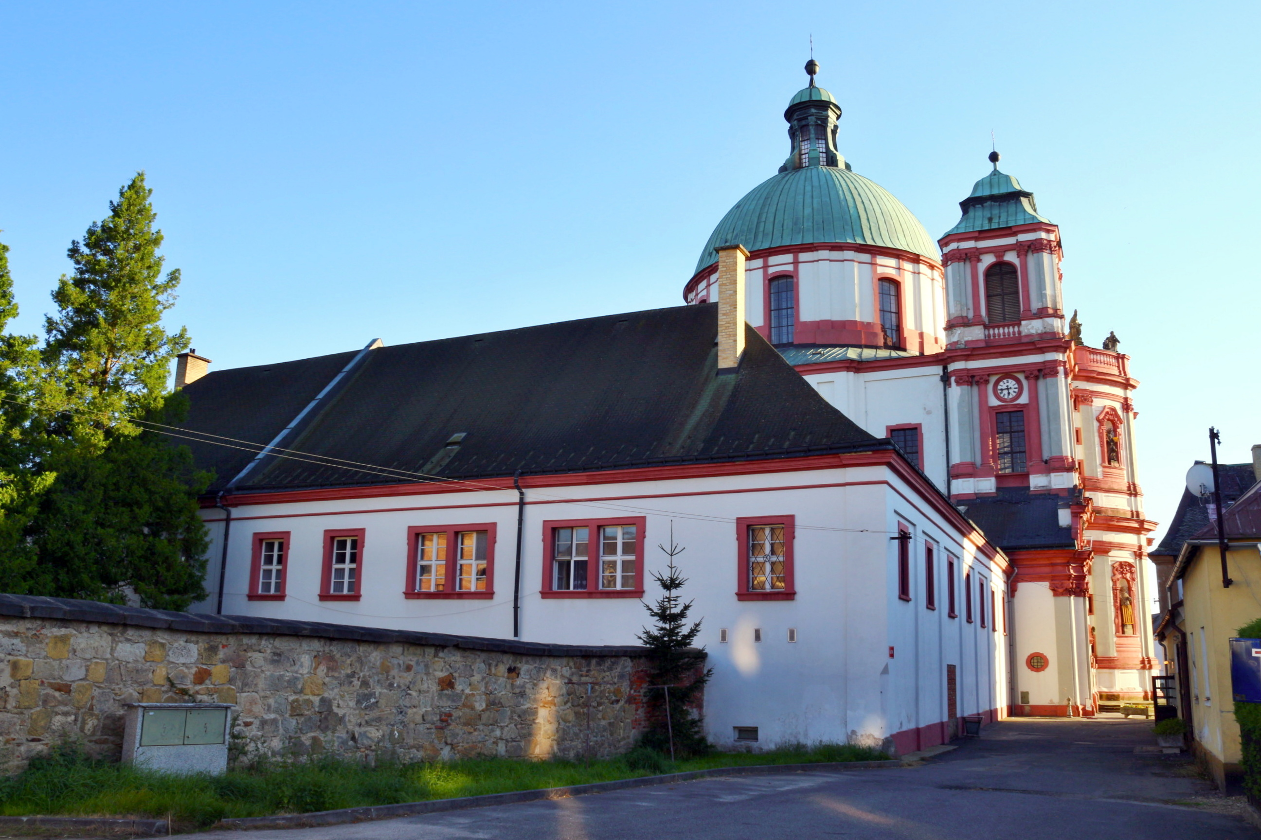 Dominikánský klášter v Jablonném v Podještědí